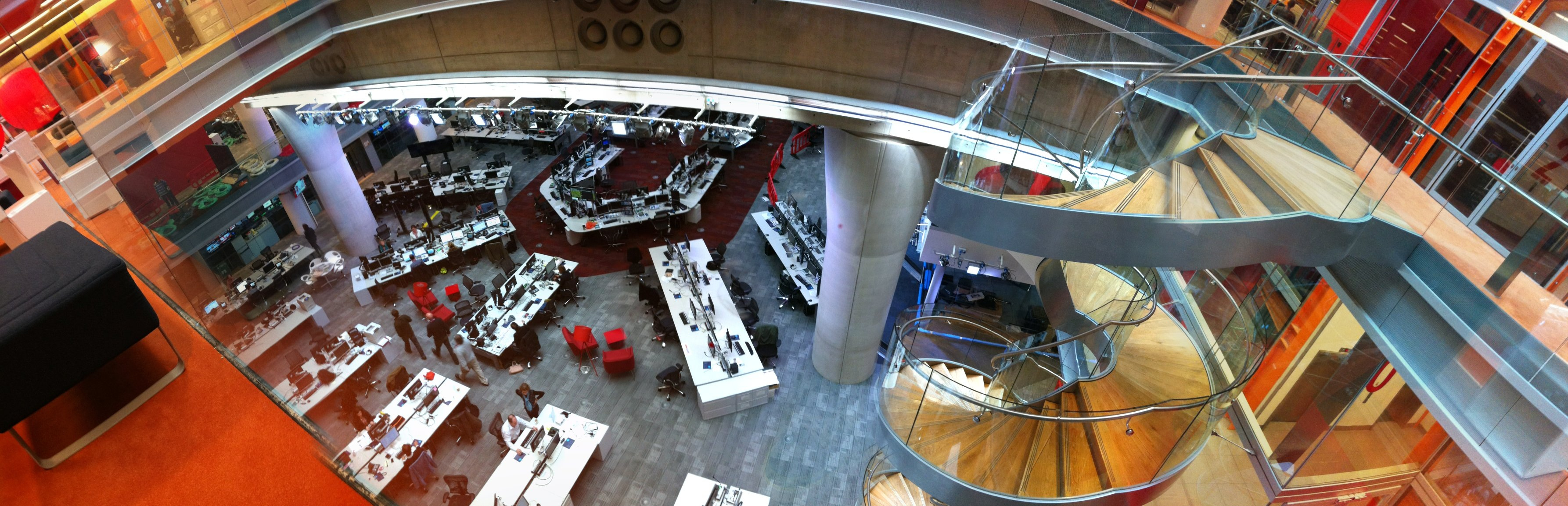 Newsroom